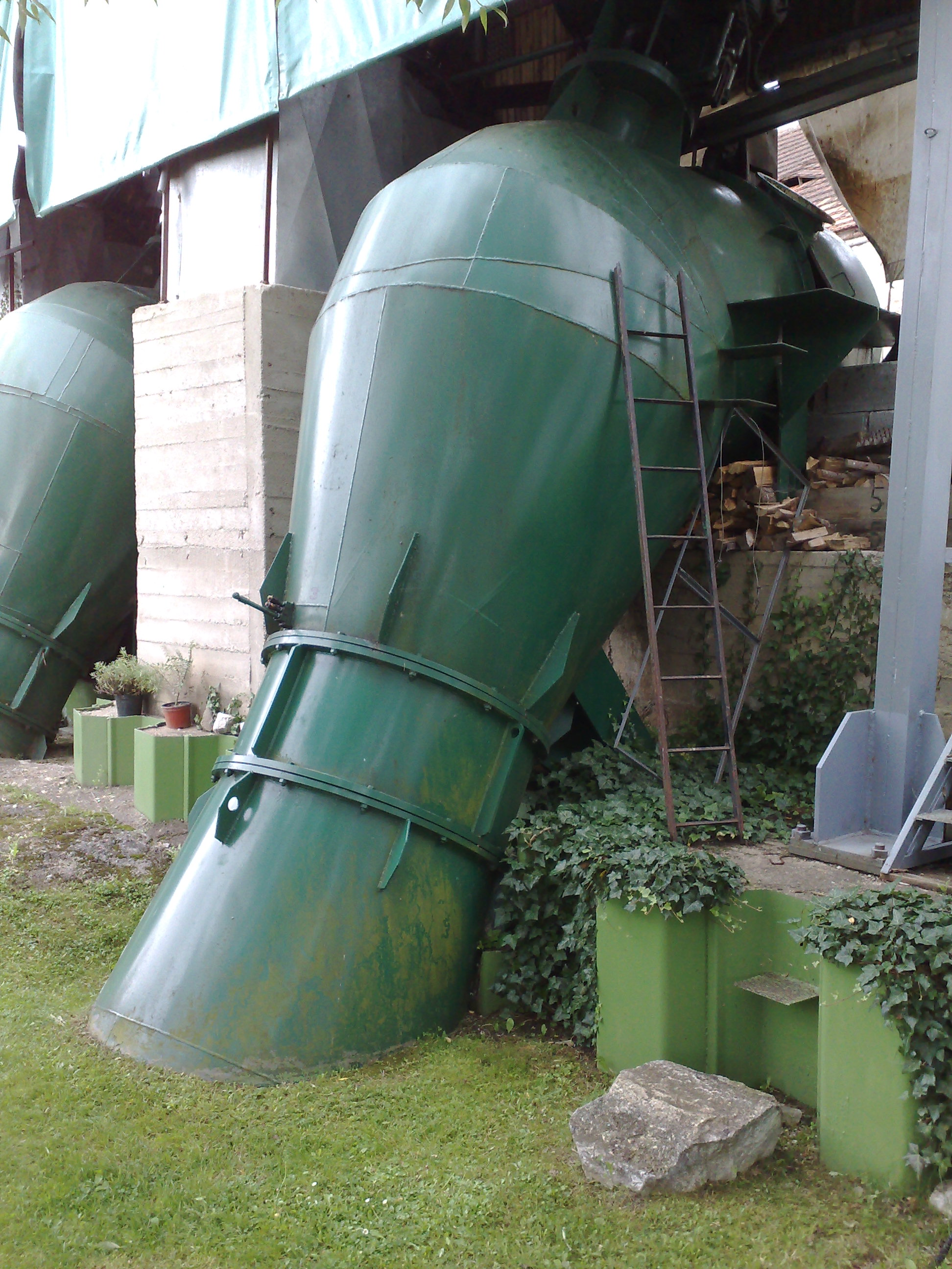 Savka přepadové elektrárny.